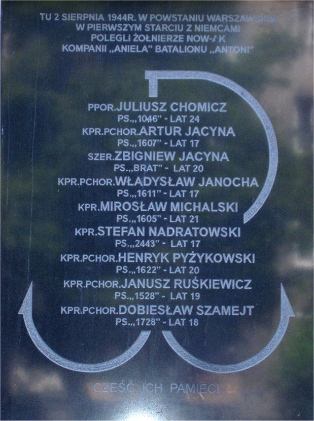 Tablica pamiątkowa przy Górczewskiej 45 w Warszawie (fot Zu)